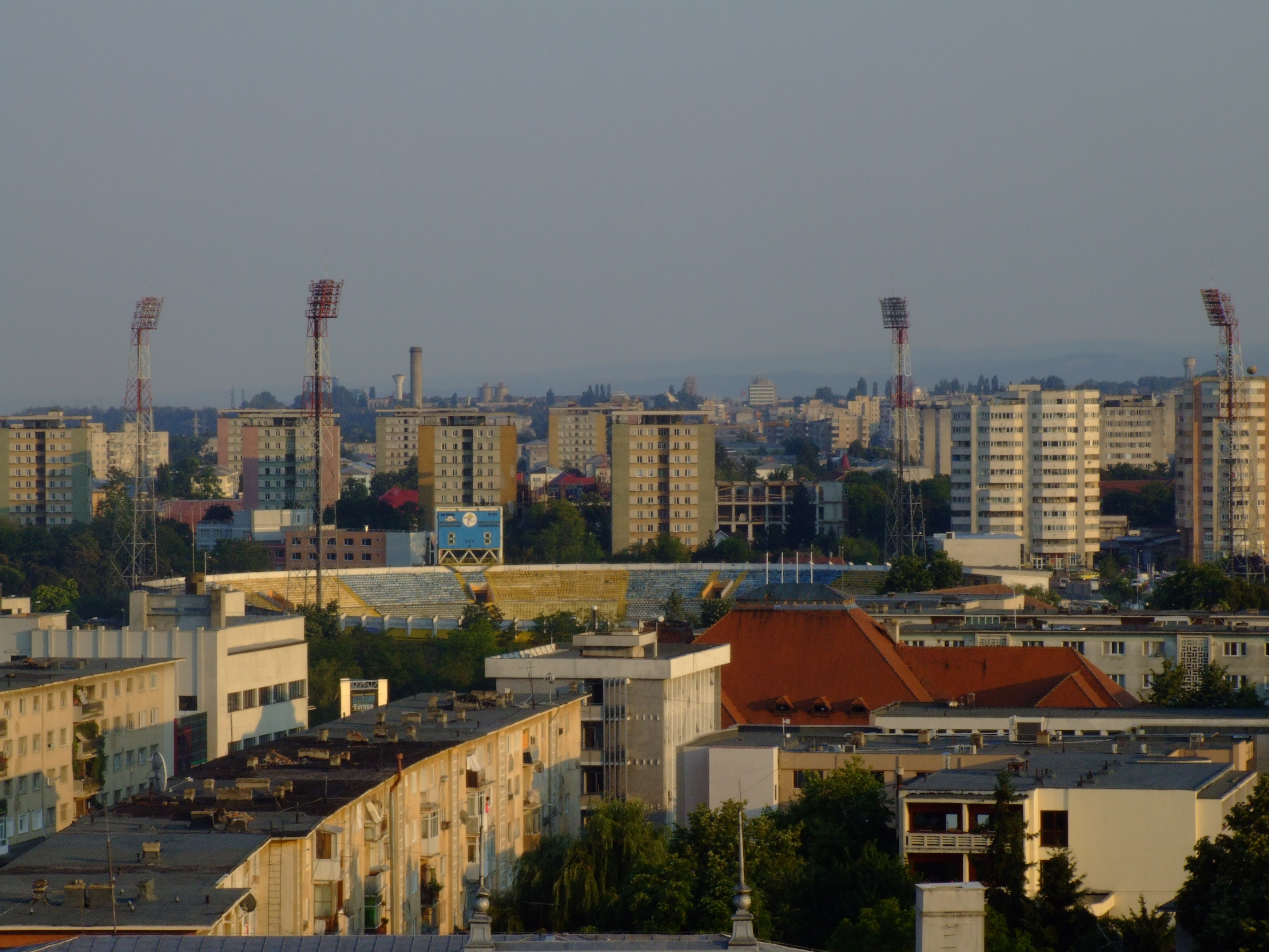 Impressionen aus Bacău, 2007. Piemontèis: Lë stadi dël balon con panorama dla sità.